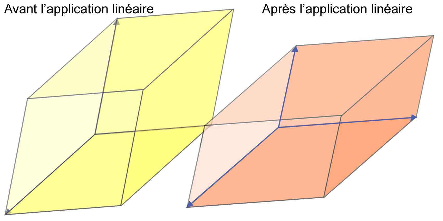 Summary Image d'un cube par un endomorphisme de dimension 3 diagonalisable, on obtient un parrallélépipède.Jean-Luc W 2 avril 2006 à 00:10 (CEST) GeometrieImages Template:Portail mathématiques